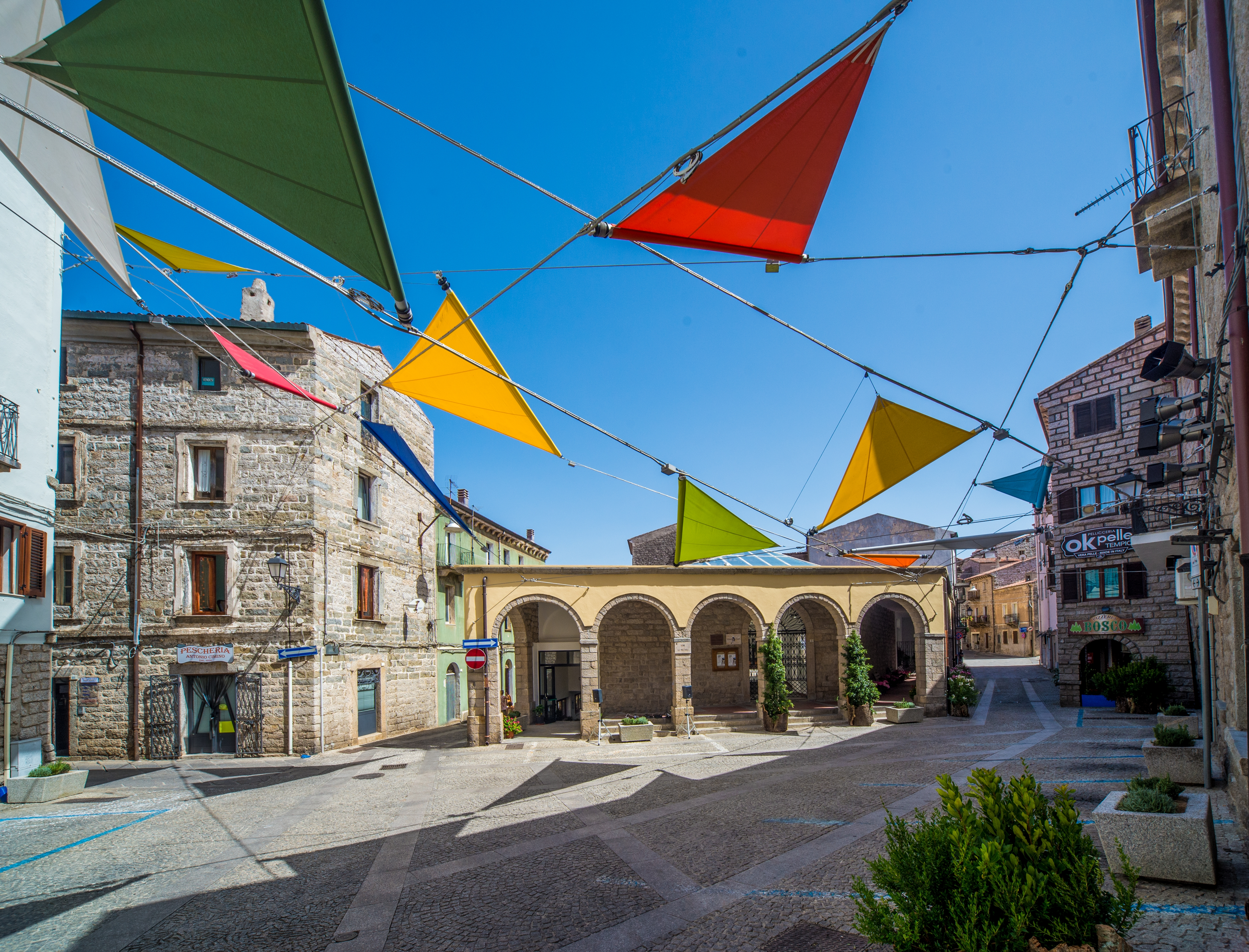 Piazza De André con Le Vele progettate da Renzo Piano